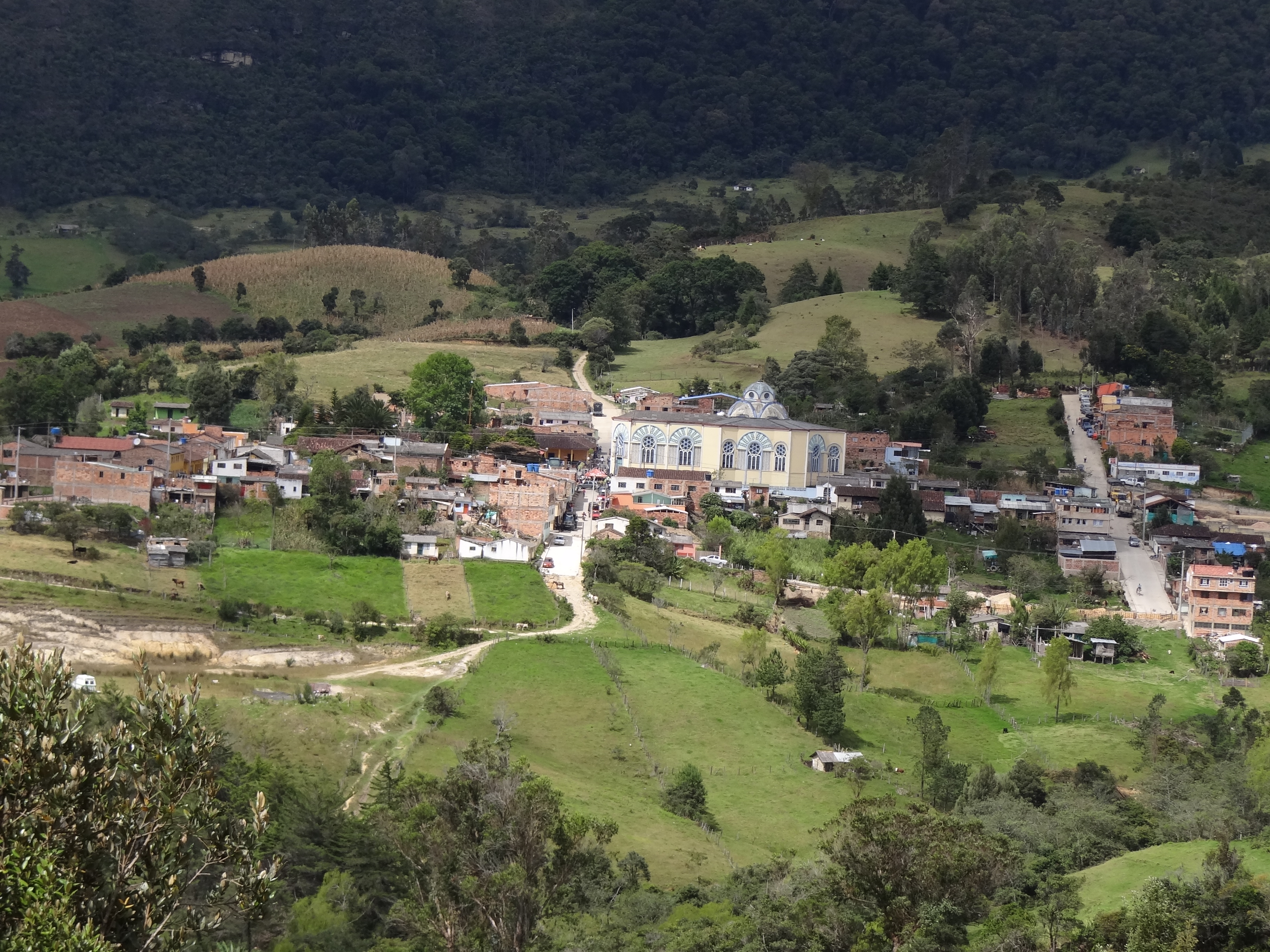 Área urbana del municipio de Gachantivá, departamento de Boyacá, Colombia